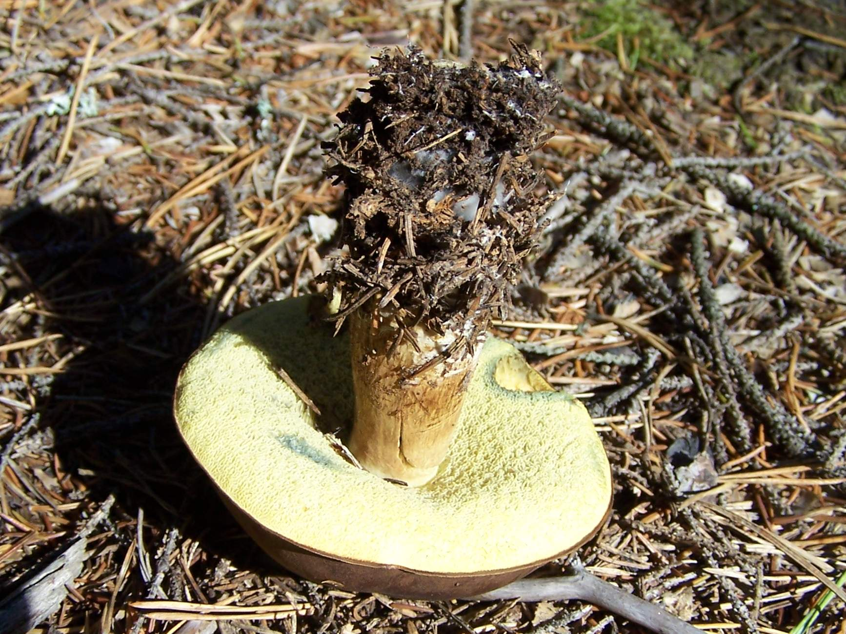 Xerocomus badius = Boletus badius (pl. podgrzybek brunatny = borowik kasztanowy)